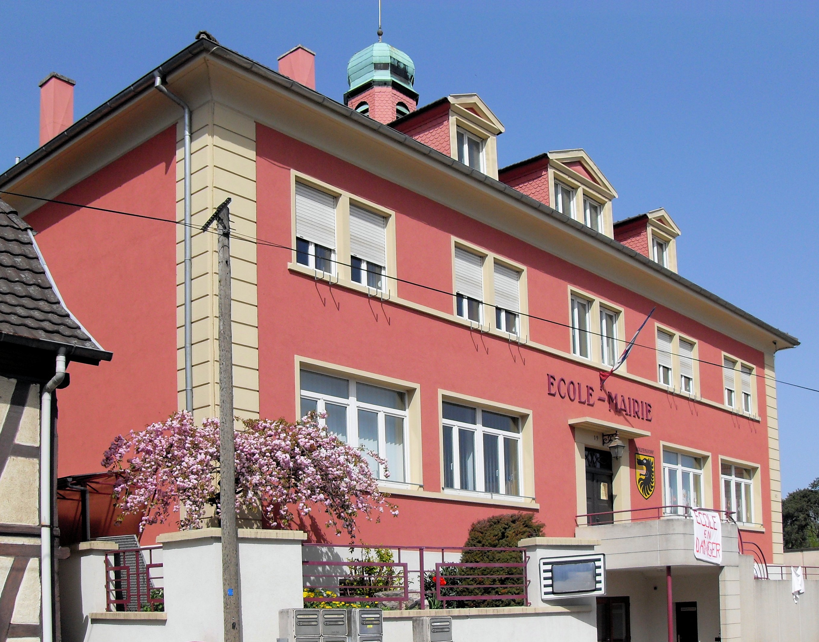 La mairie-école de Wolfersdorf